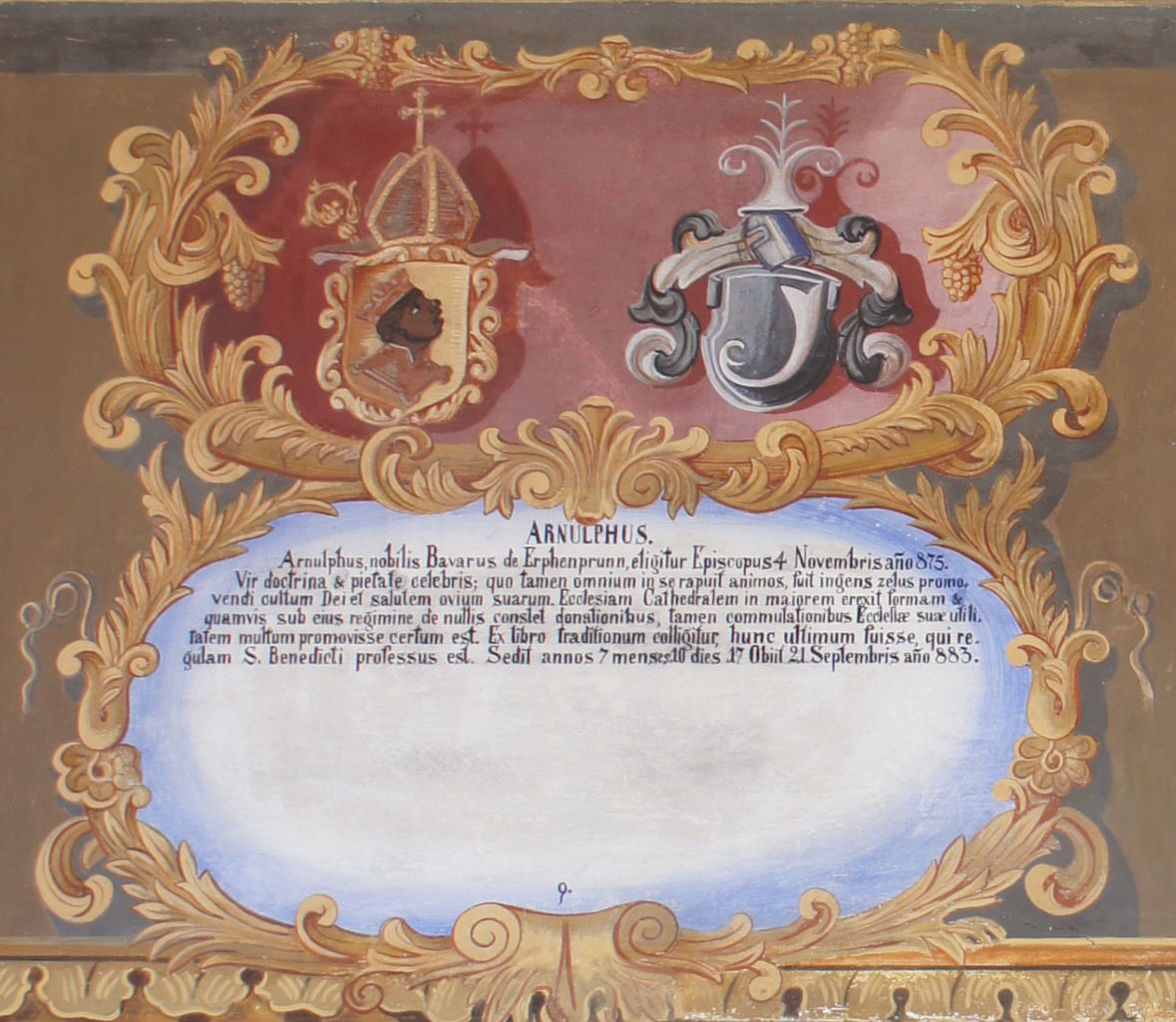 Wappentafel von Arnold, Bischof von Freising, im Fürstengang zwischen Fürstbischöflicher Residenz und Freisinger Dom. Links das geistliche, rechts das persönliche Wappen, darunter ein lateinischer Text mit kurzer Biographie.